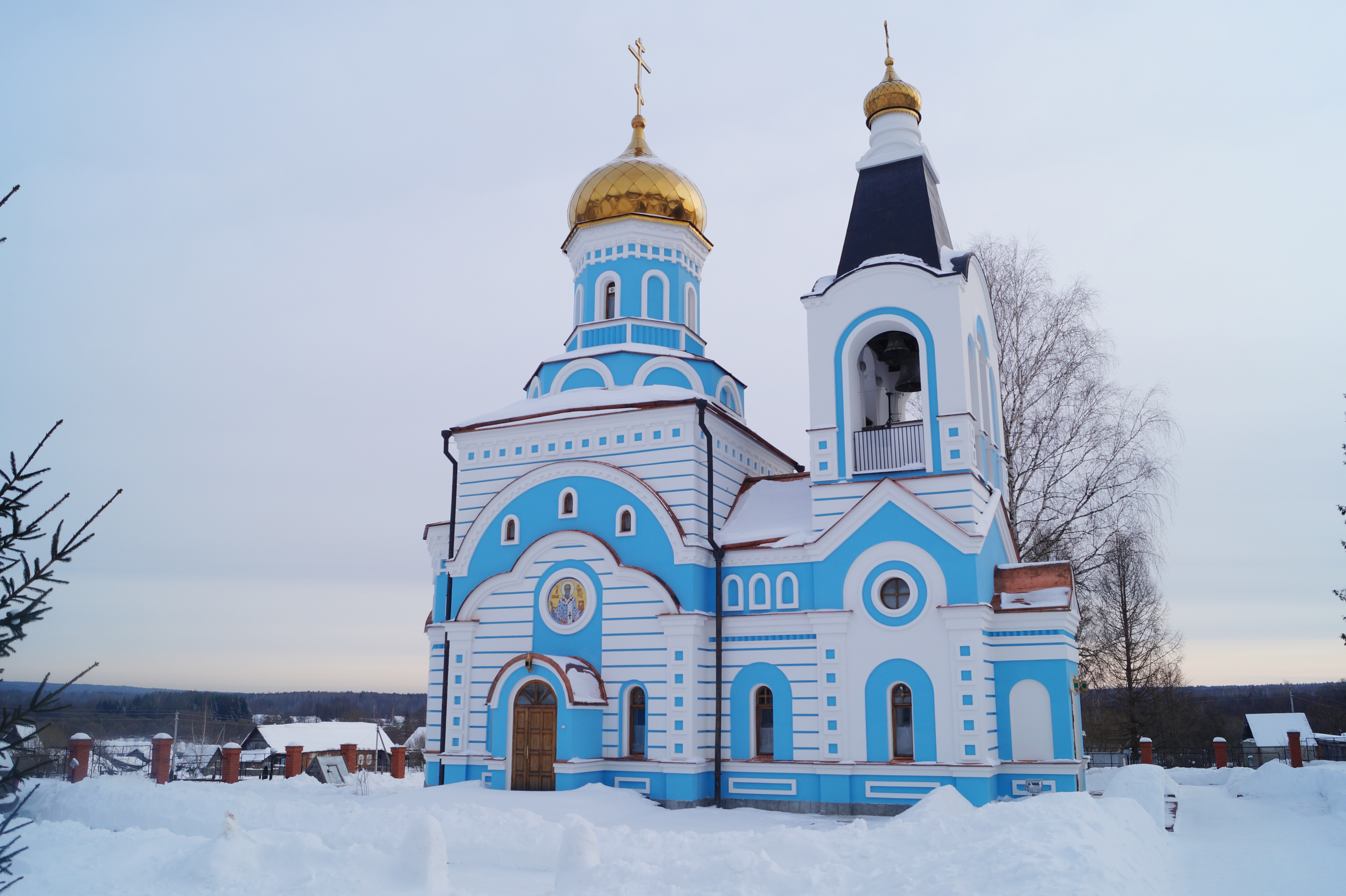 Хотьково (Думиничский район) - церковь